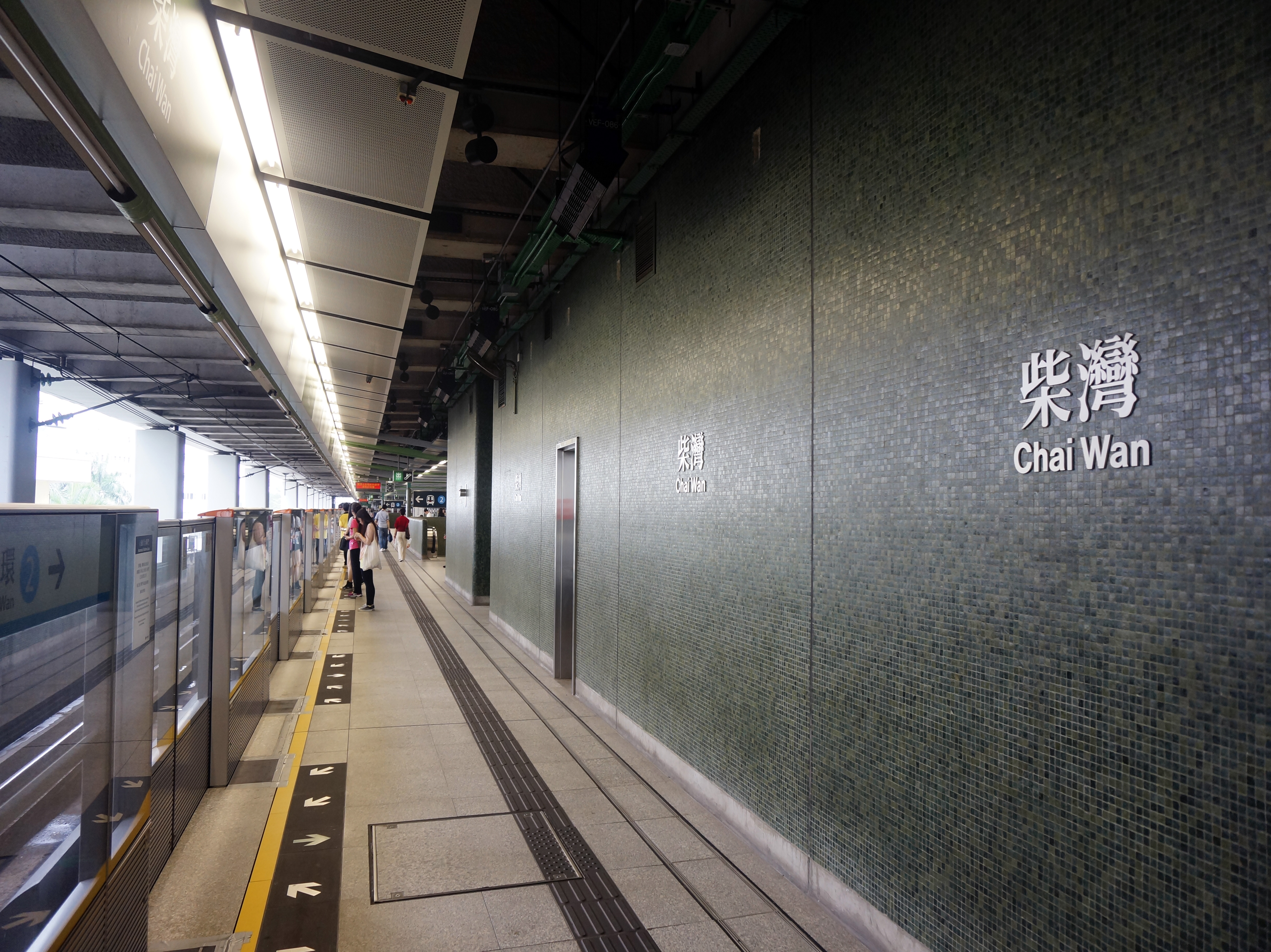 柴灣港鐵站月台